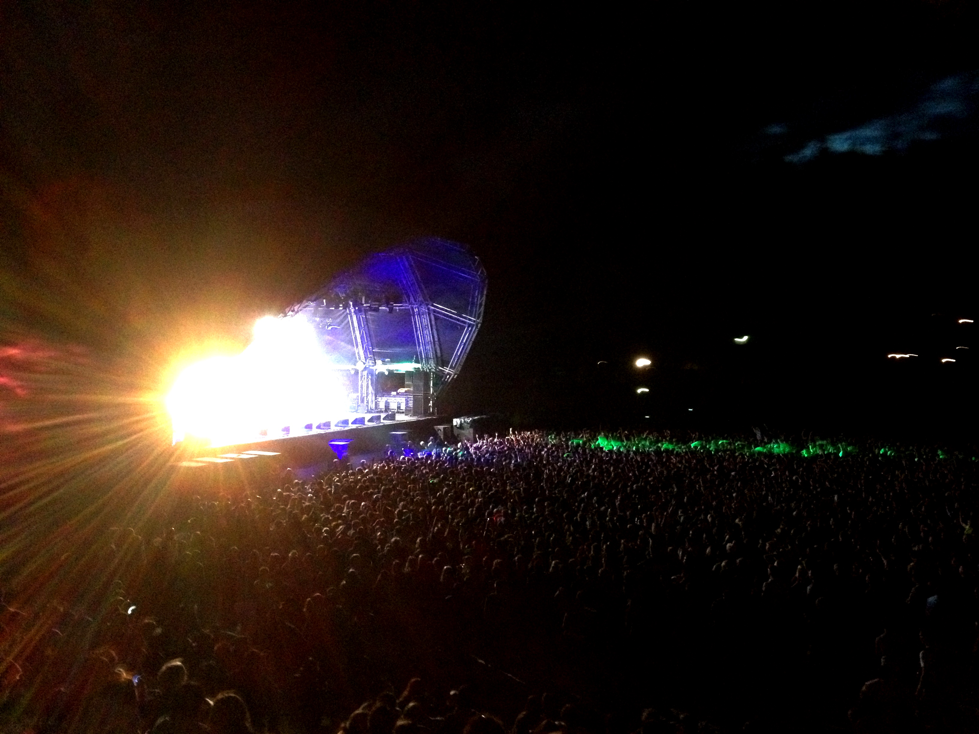 @Hove2012